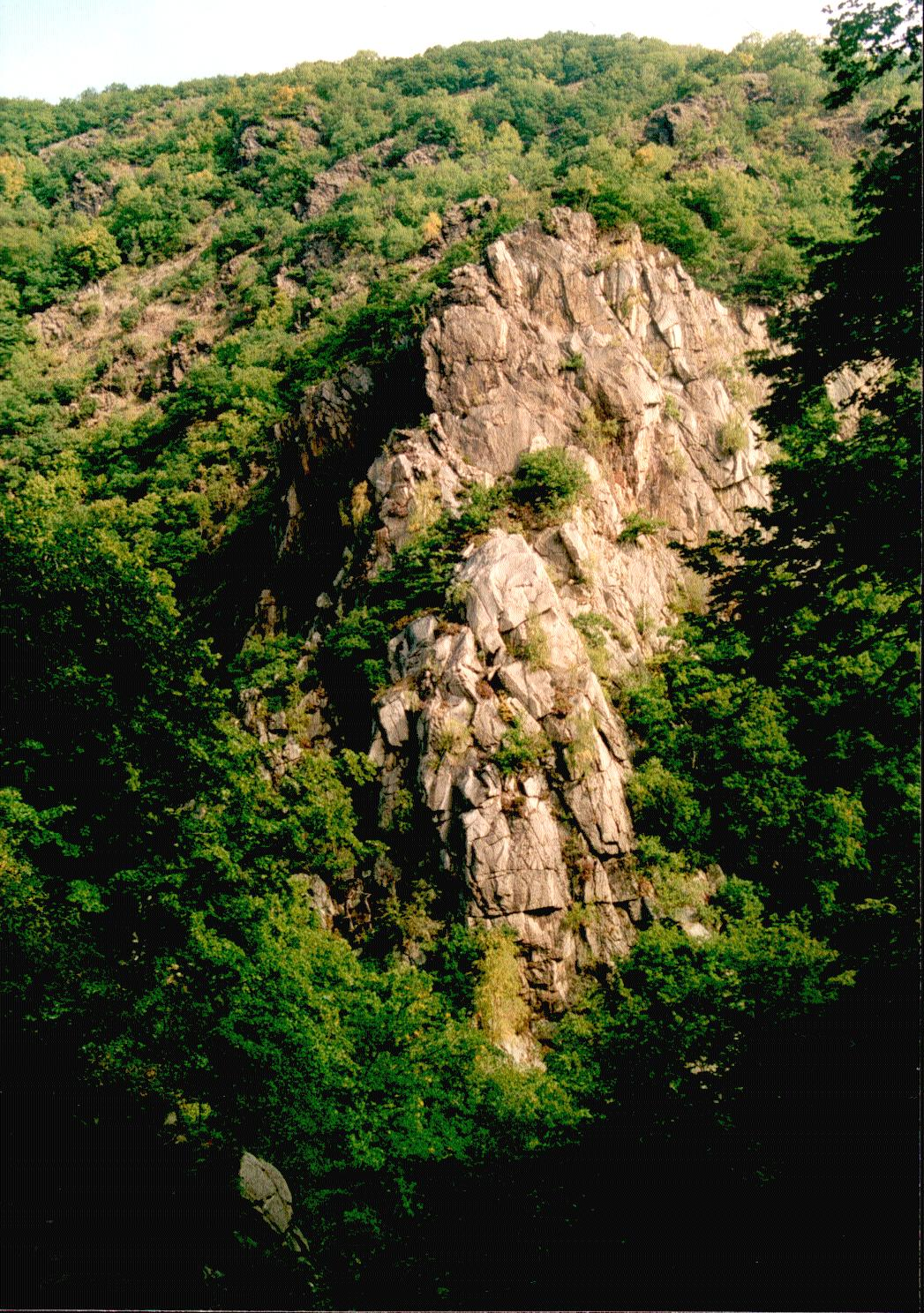 Fels im Bodetal.